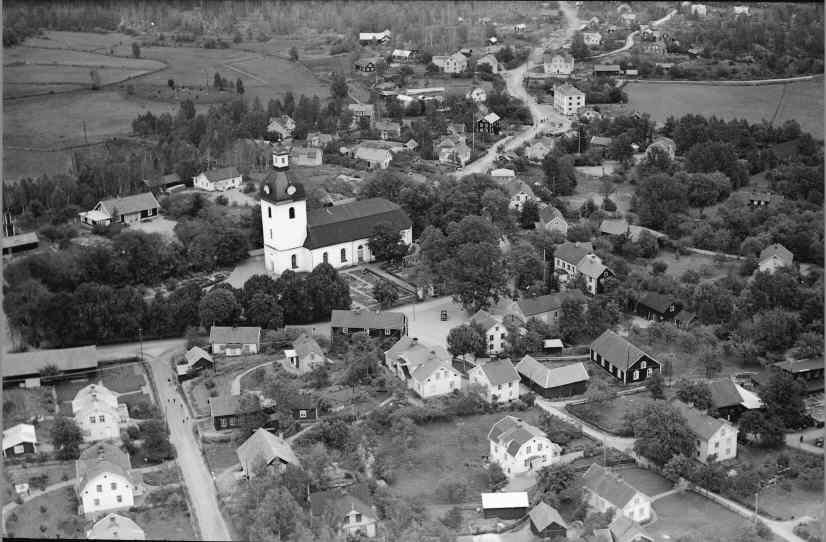 Kyrkan och dess omgivning. Flygfoto.